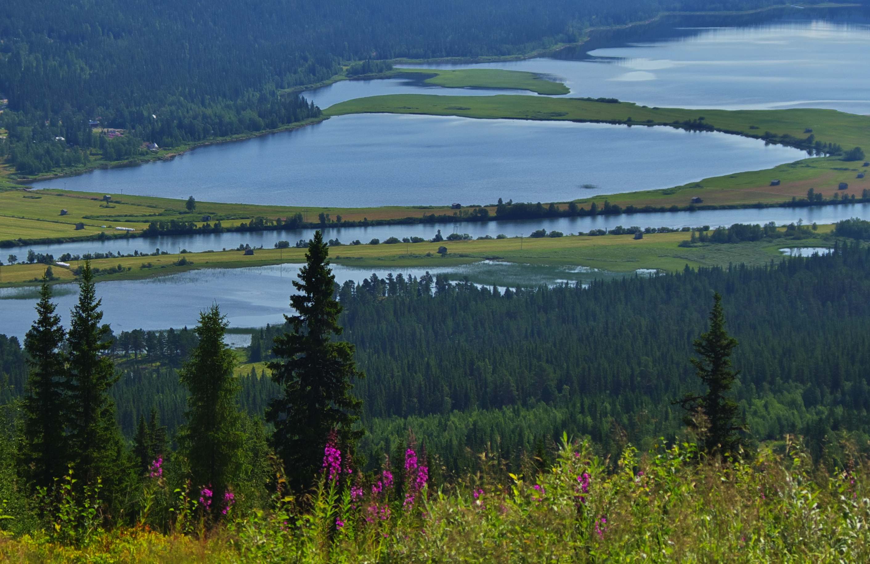 Nolavan är en sjö i Sorsele kommun i Lappland. Sjön ligger i Natura 2000-området Ammarnäsdeltat.